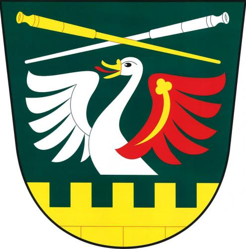 znak obce Petrovice II